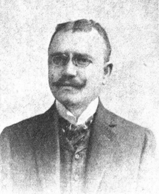 Österreichischer Politiker, Reichsratswahl 1907, Name siehe Dateiname